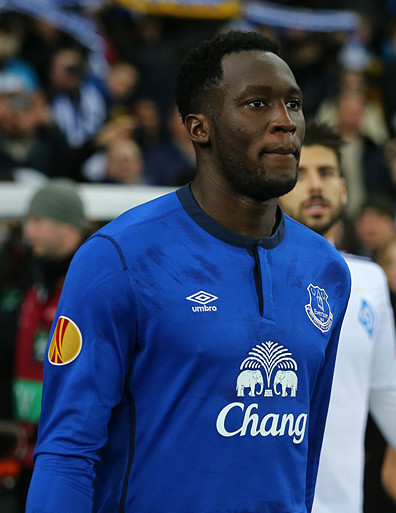 Romelu Lukaku entering the stadium